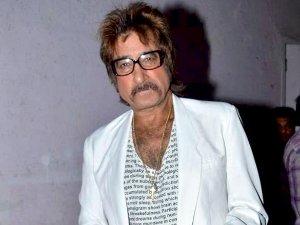 Shakti Kapoor